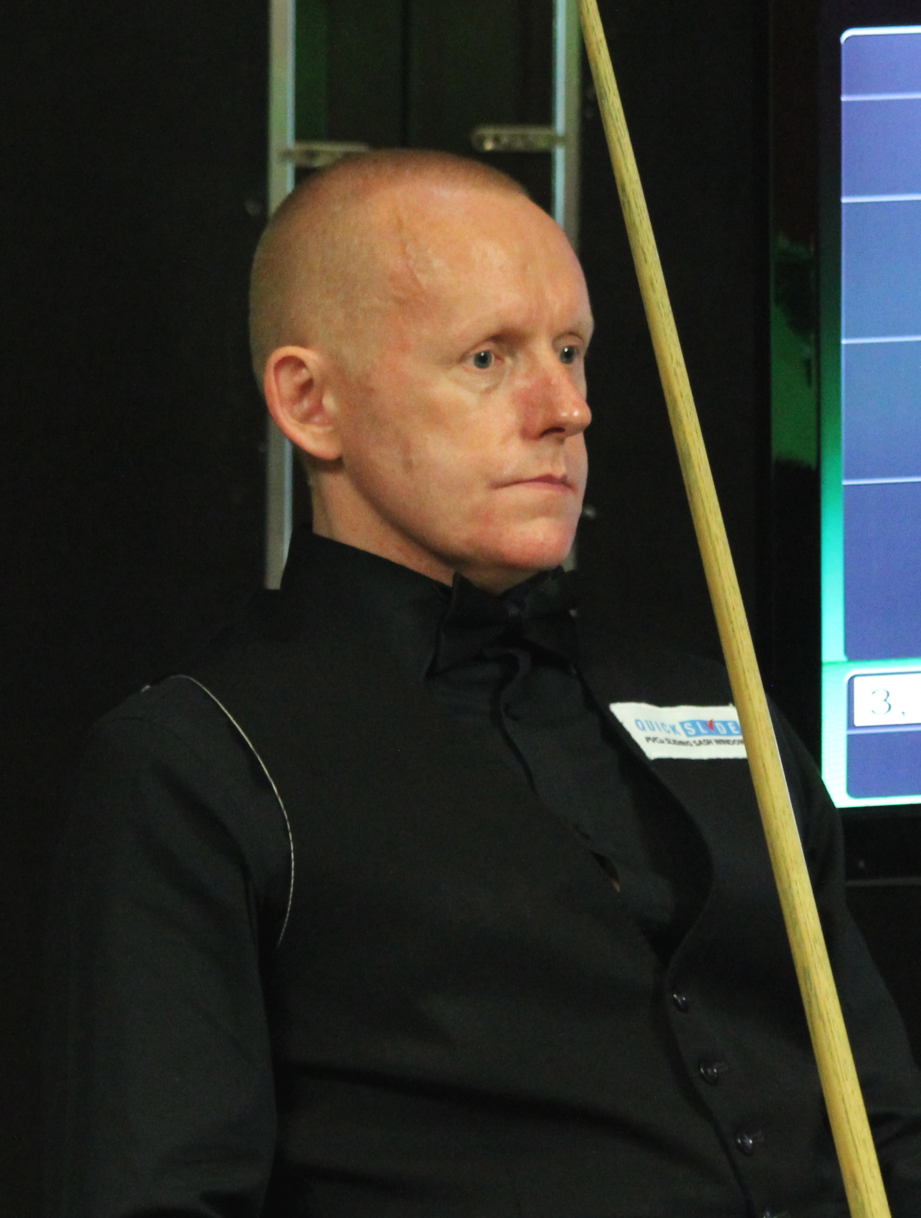 Paul Davison beim Paul Hunter Classic 2016